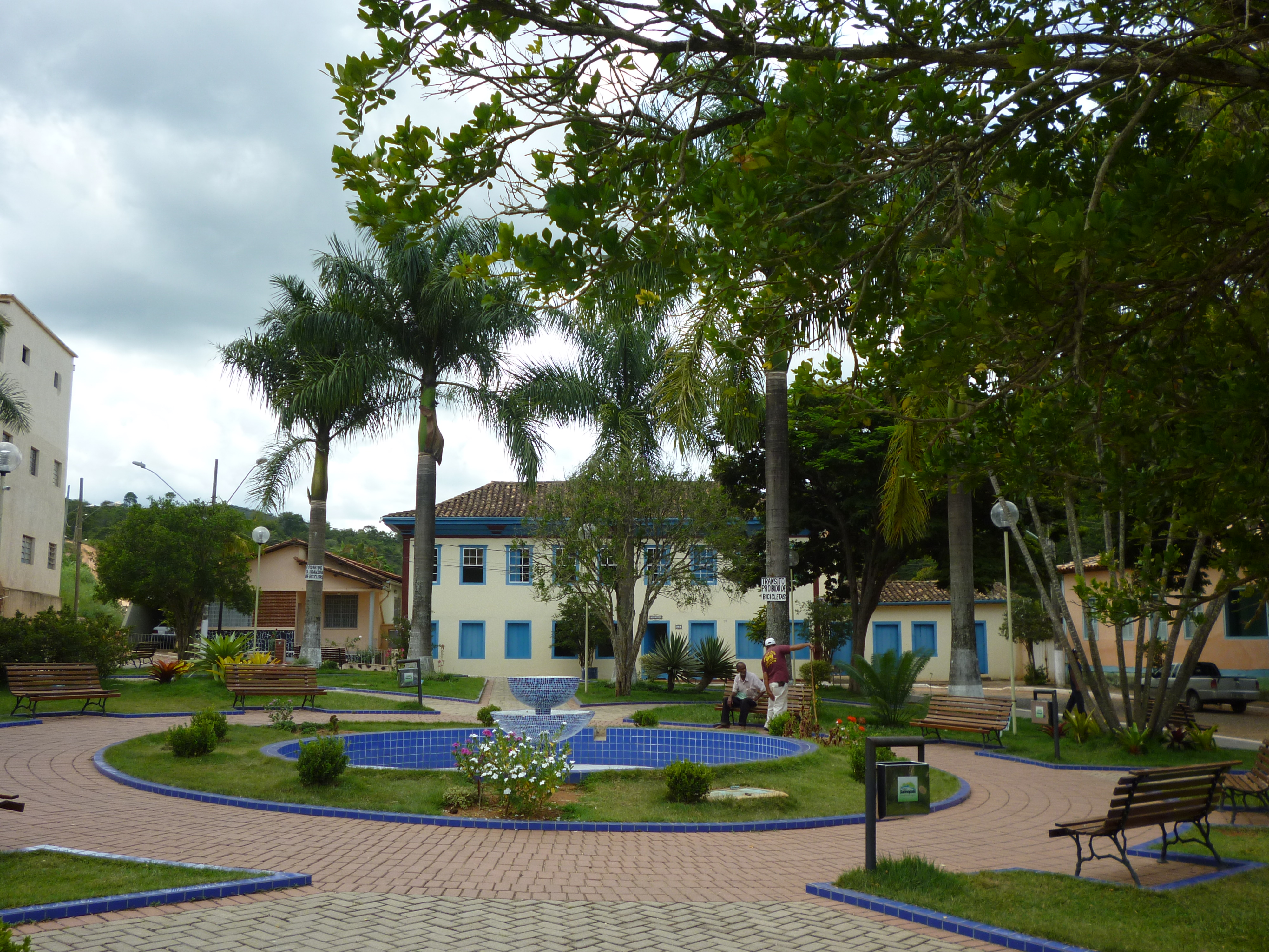 Sabinópolis MG Brasil - Vista do Sobrado Barroso